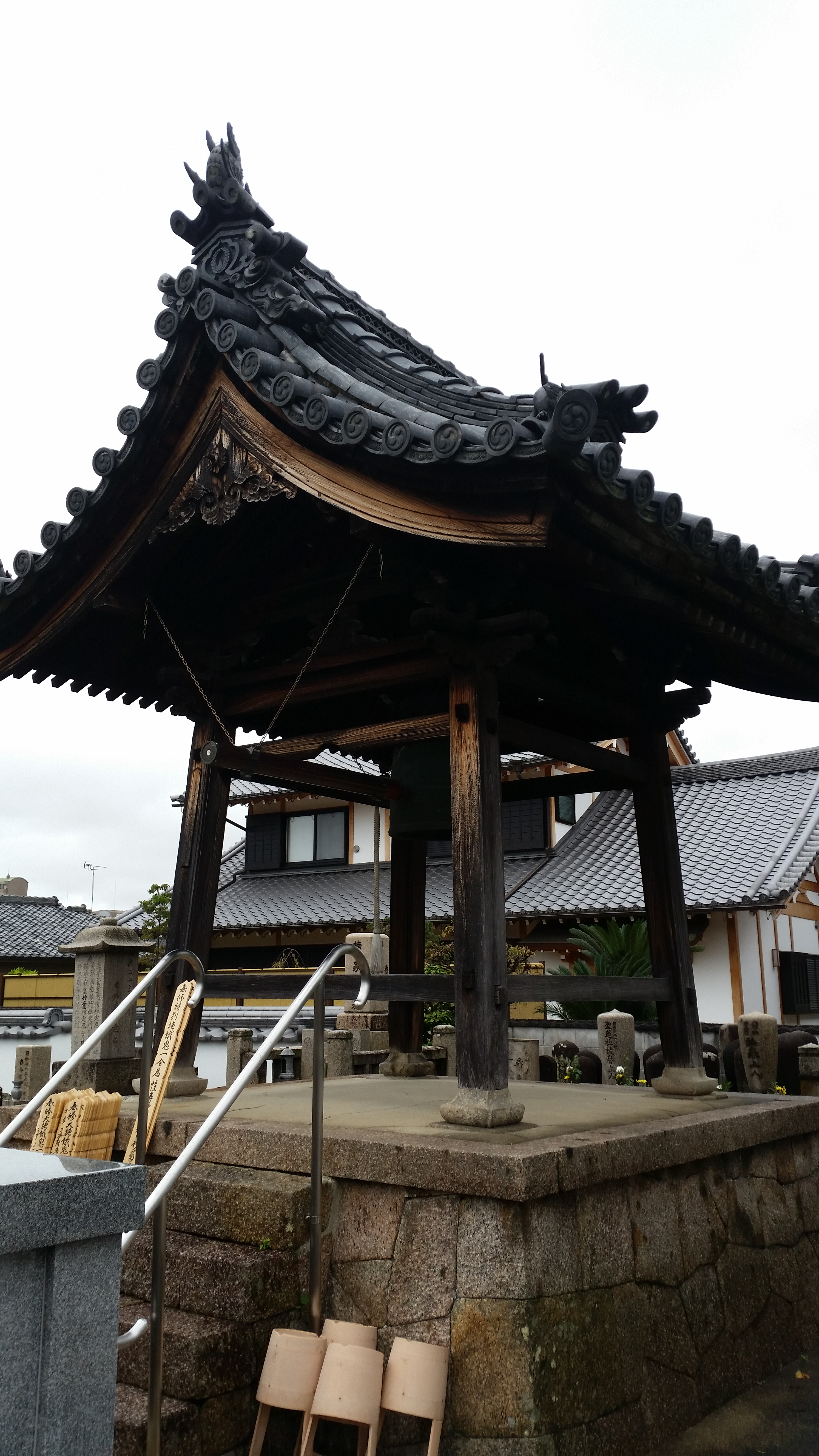 金躰寺鐘楼、奈良